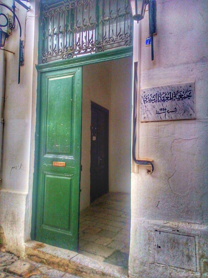 La médina de Tunis مدينة تونس العتيقة